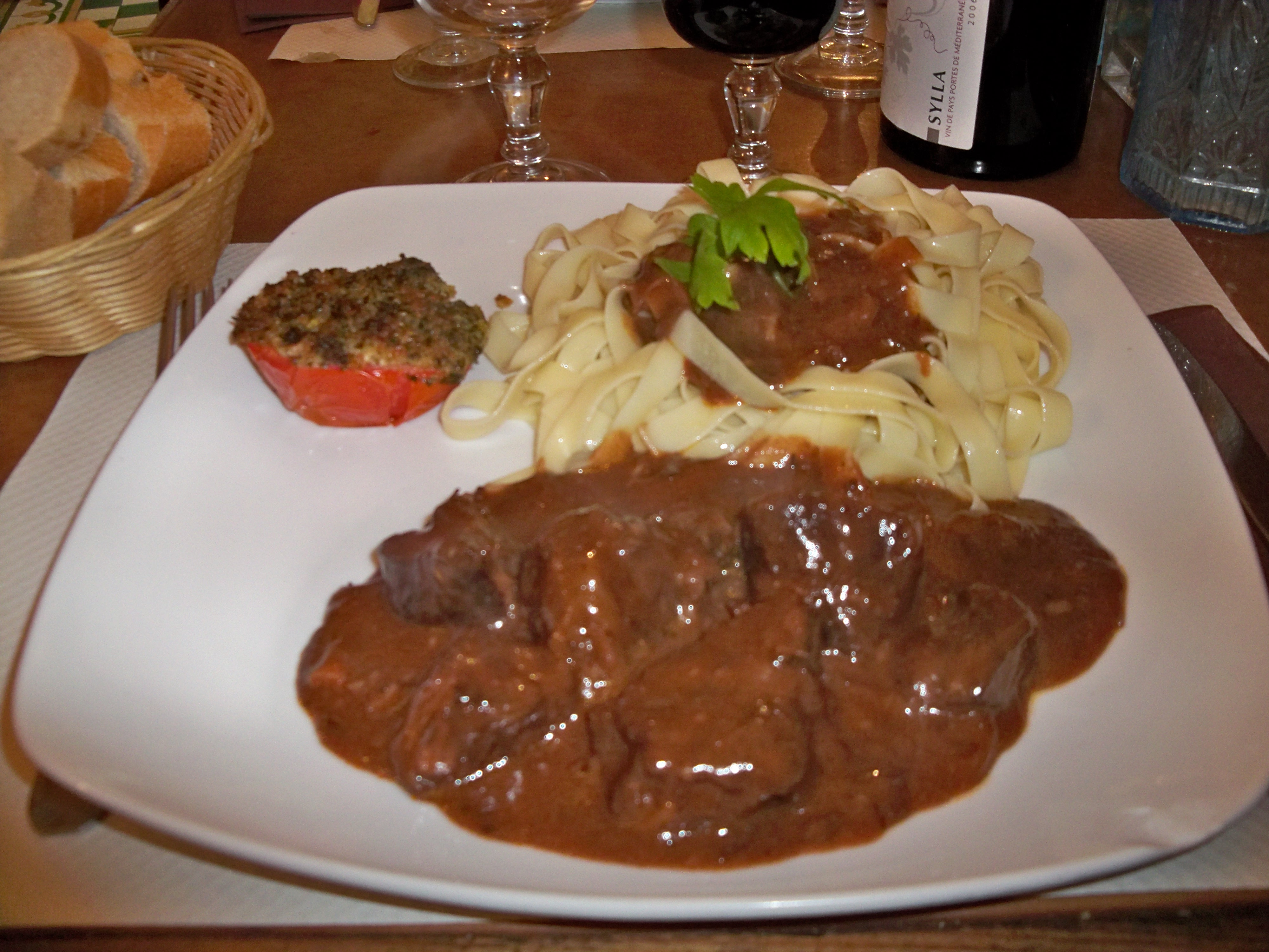 Boeuf Bourguignon, avec tagiatelles et tomate à la provençale